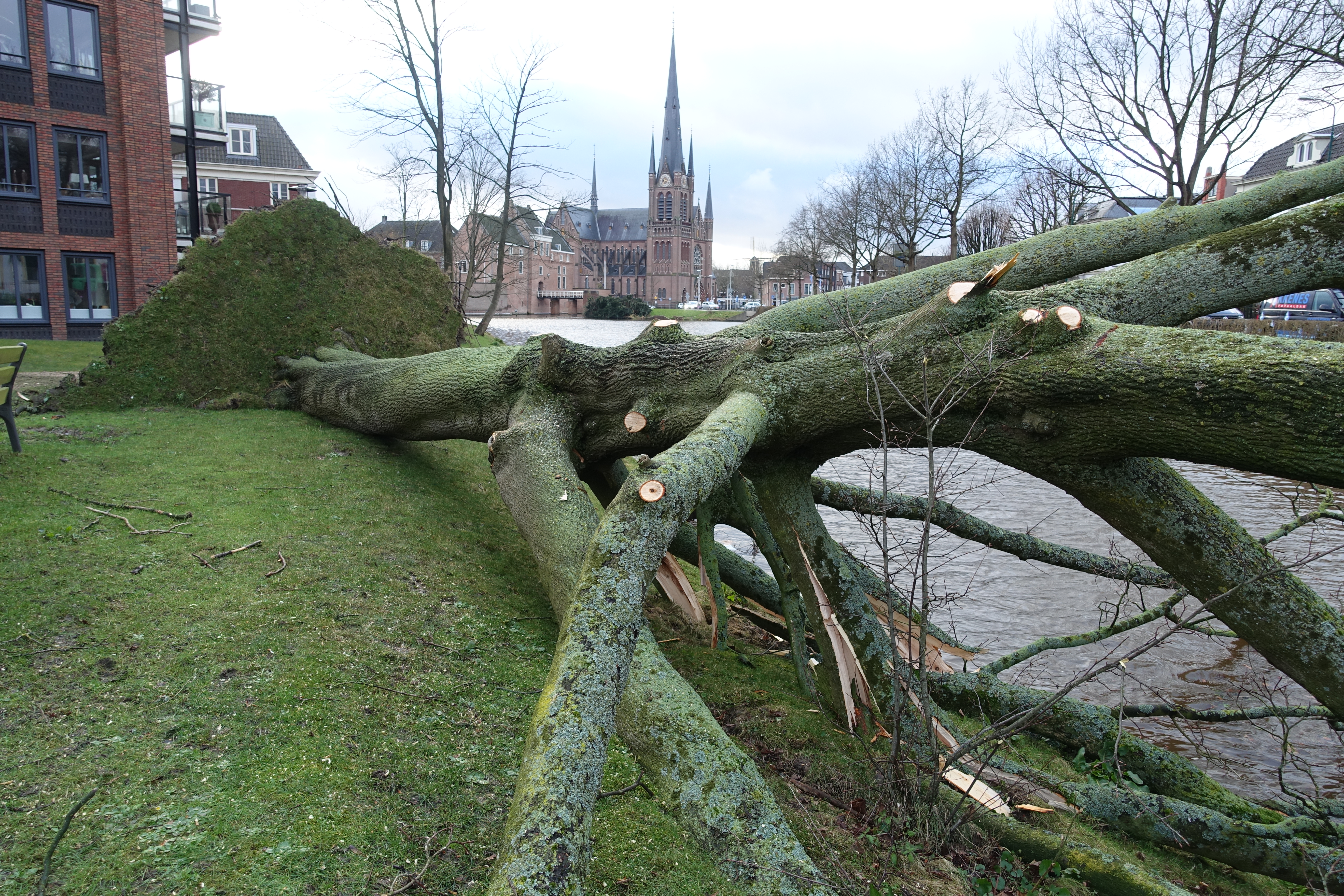 Stormschade in Woerden door storm van 18 januari 2018, Ontwortelde boom op het defensie-eiland